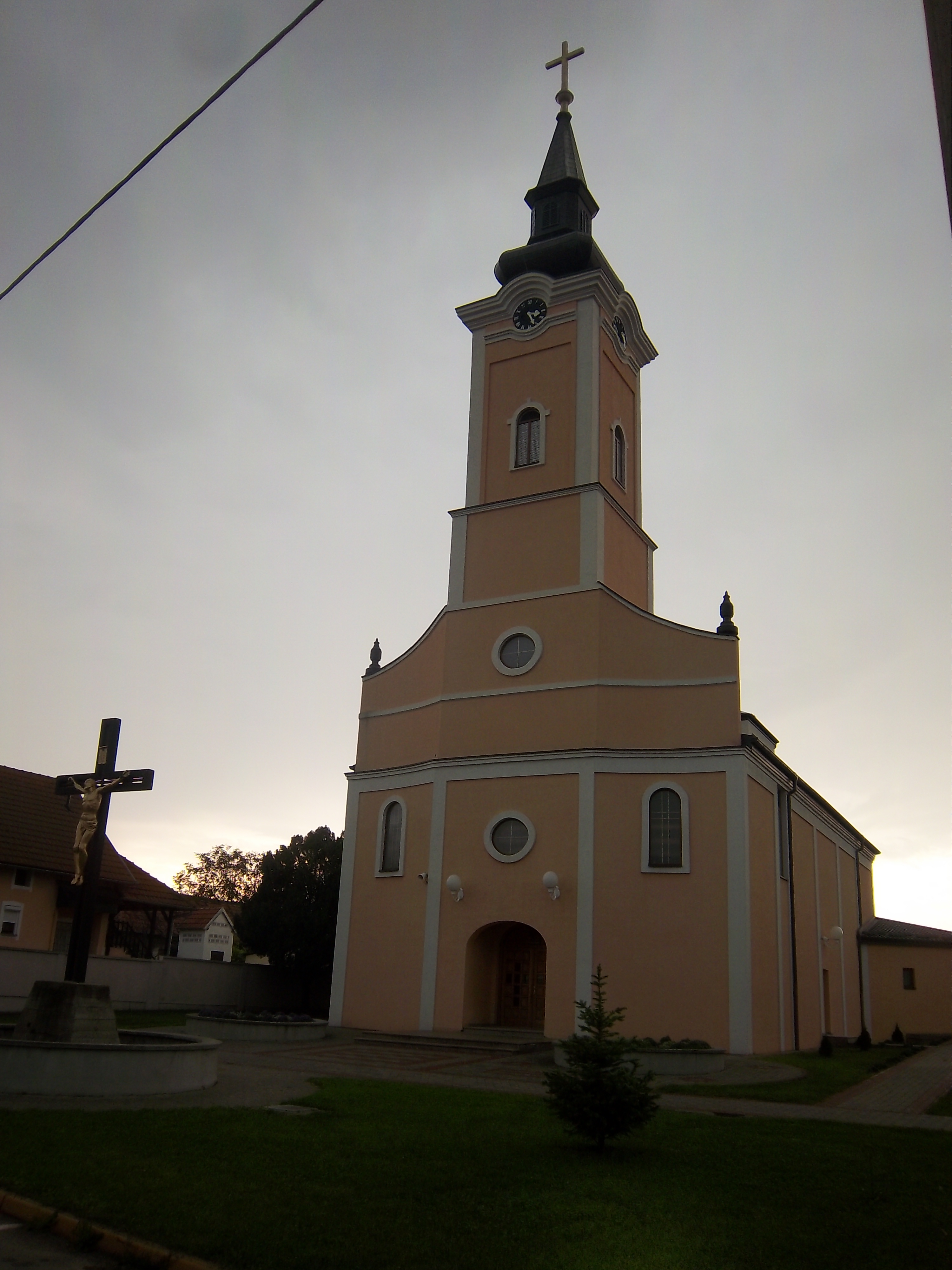 Српски (ћирилица): Насеље Церић у источној Хрватској.